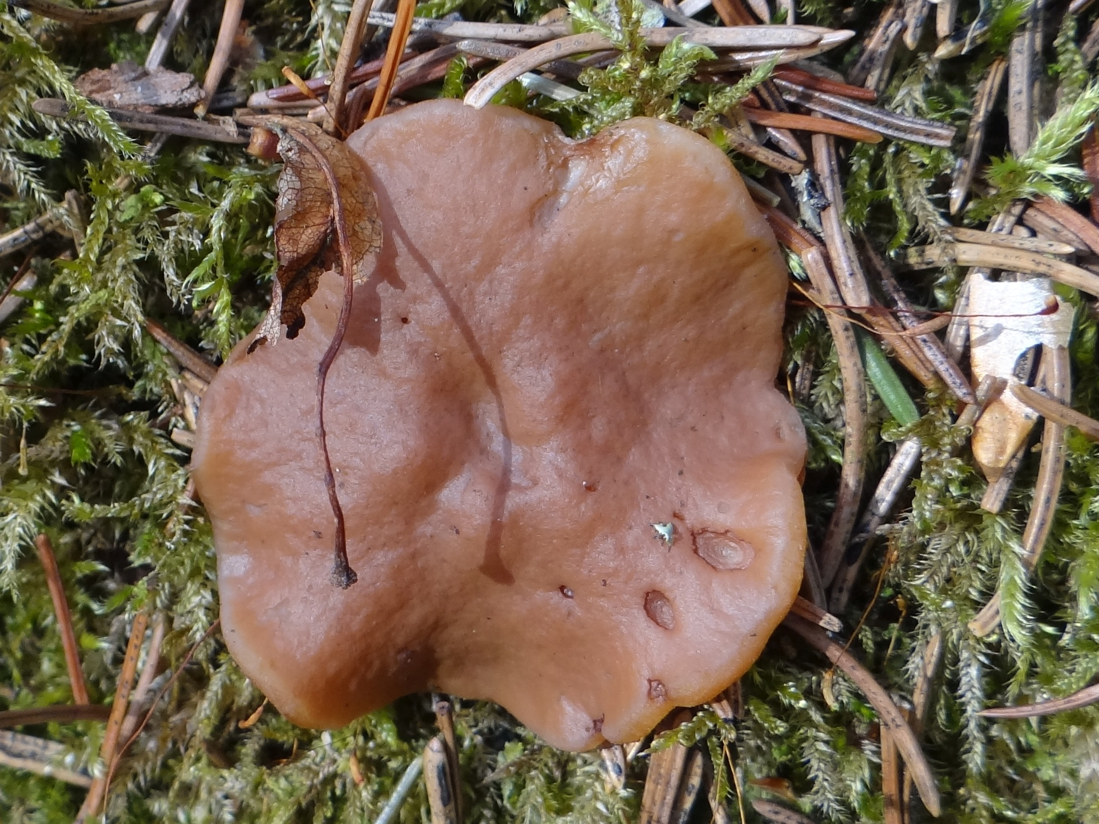 Disciotis venosa. Location: Poland, Puszcza Białowieska